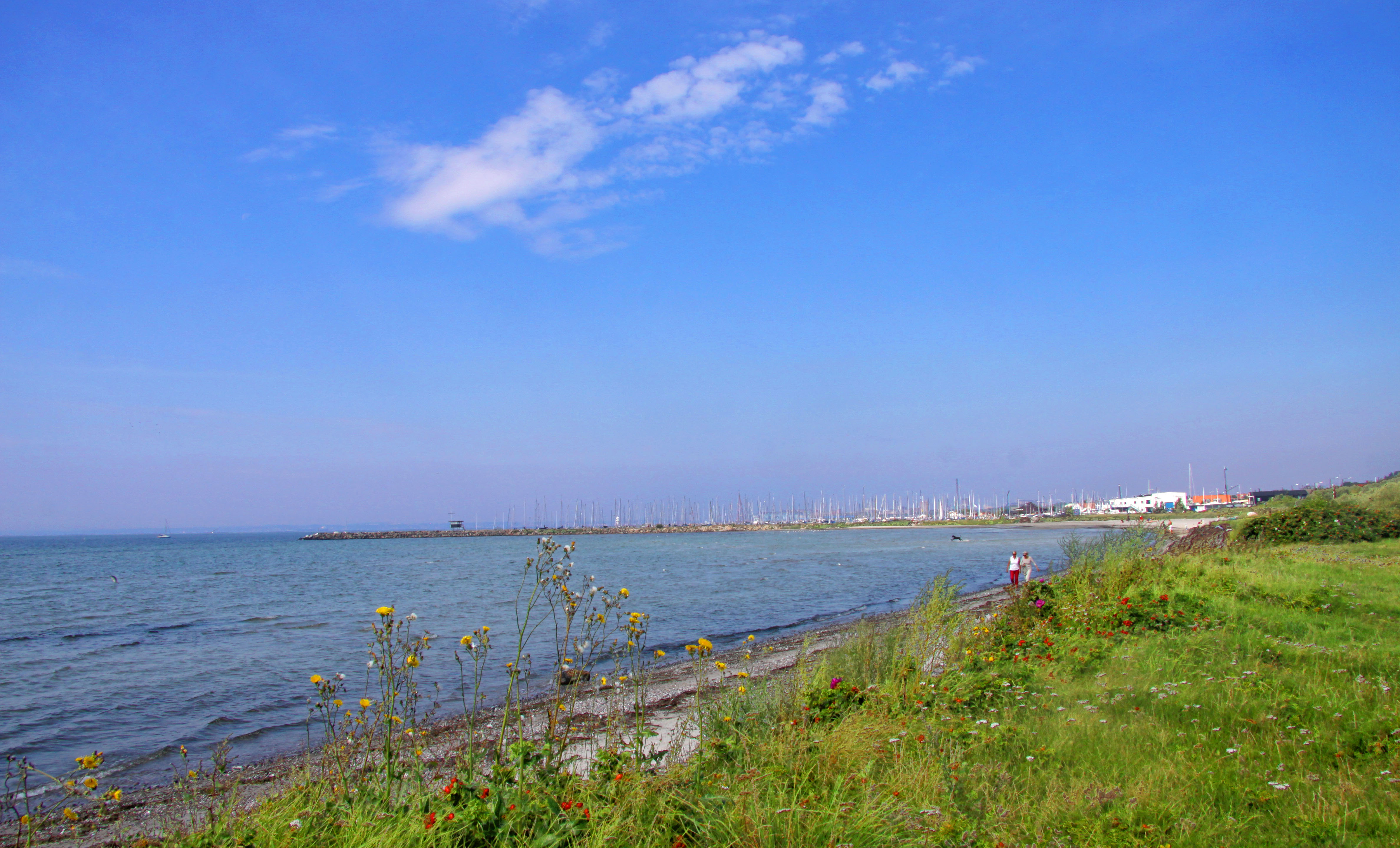 Helsingborg. På stranden mellan Råå och Rydebäck.